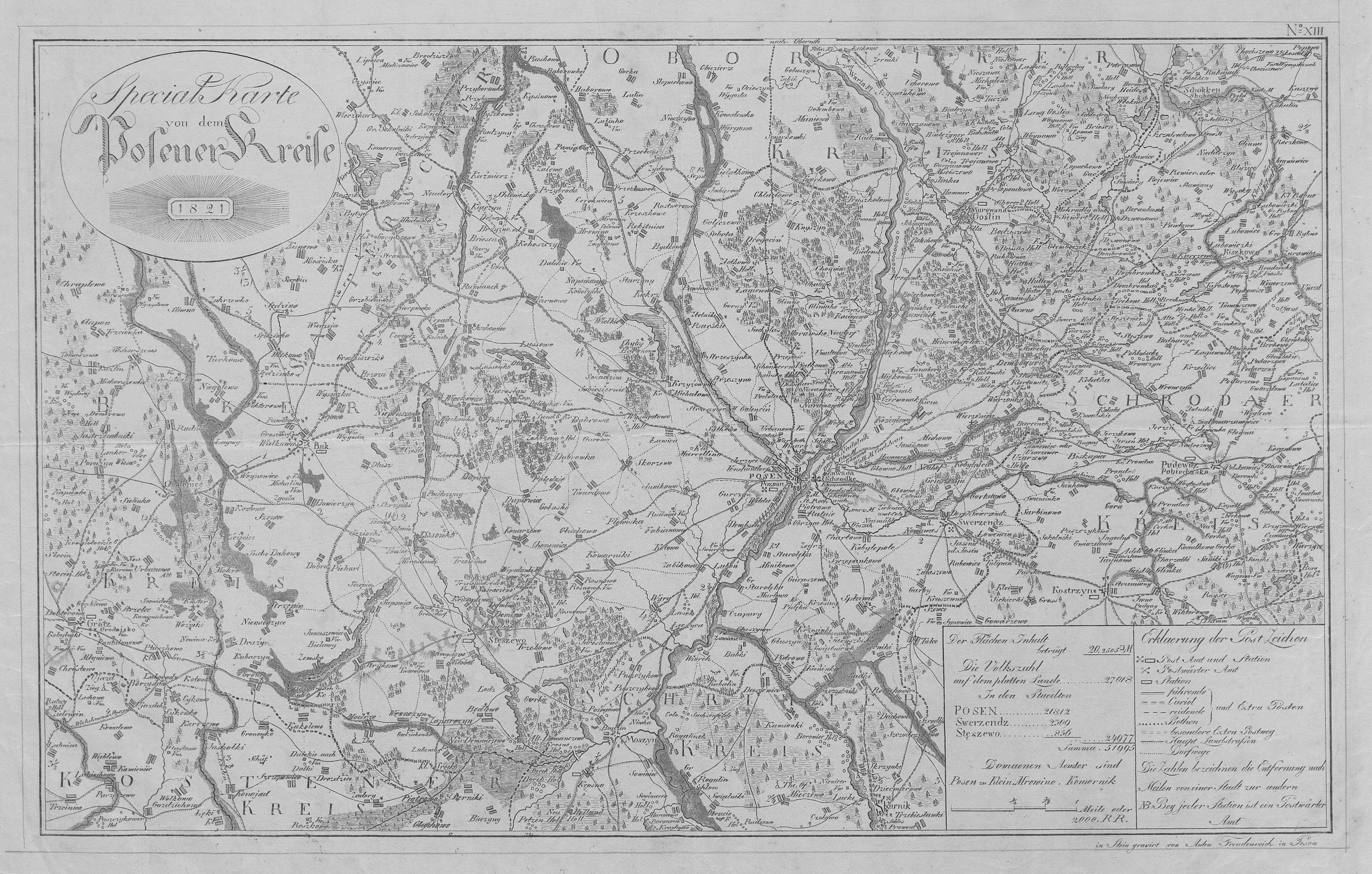 Kreis Posen as from 1818 to 1887